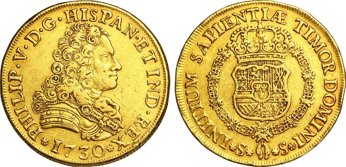 Moneda de 8 escudos de oro acuñado por Felipe V en Sevilla.